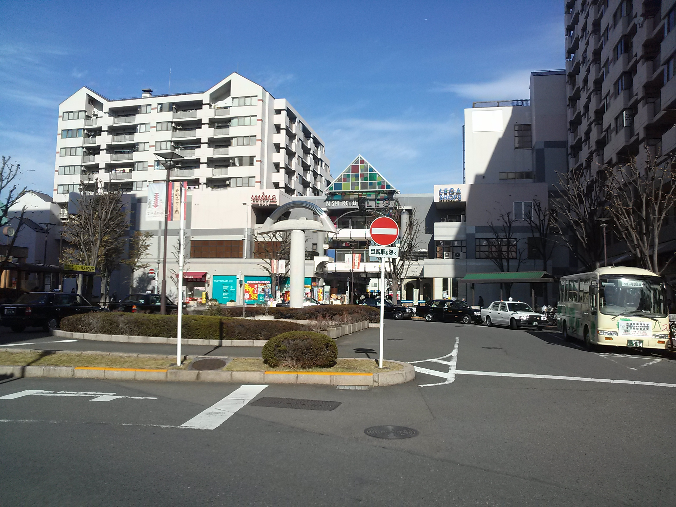 Nishi-Kokubunji Station south rotary, 西国分寺駅南口ロータリー